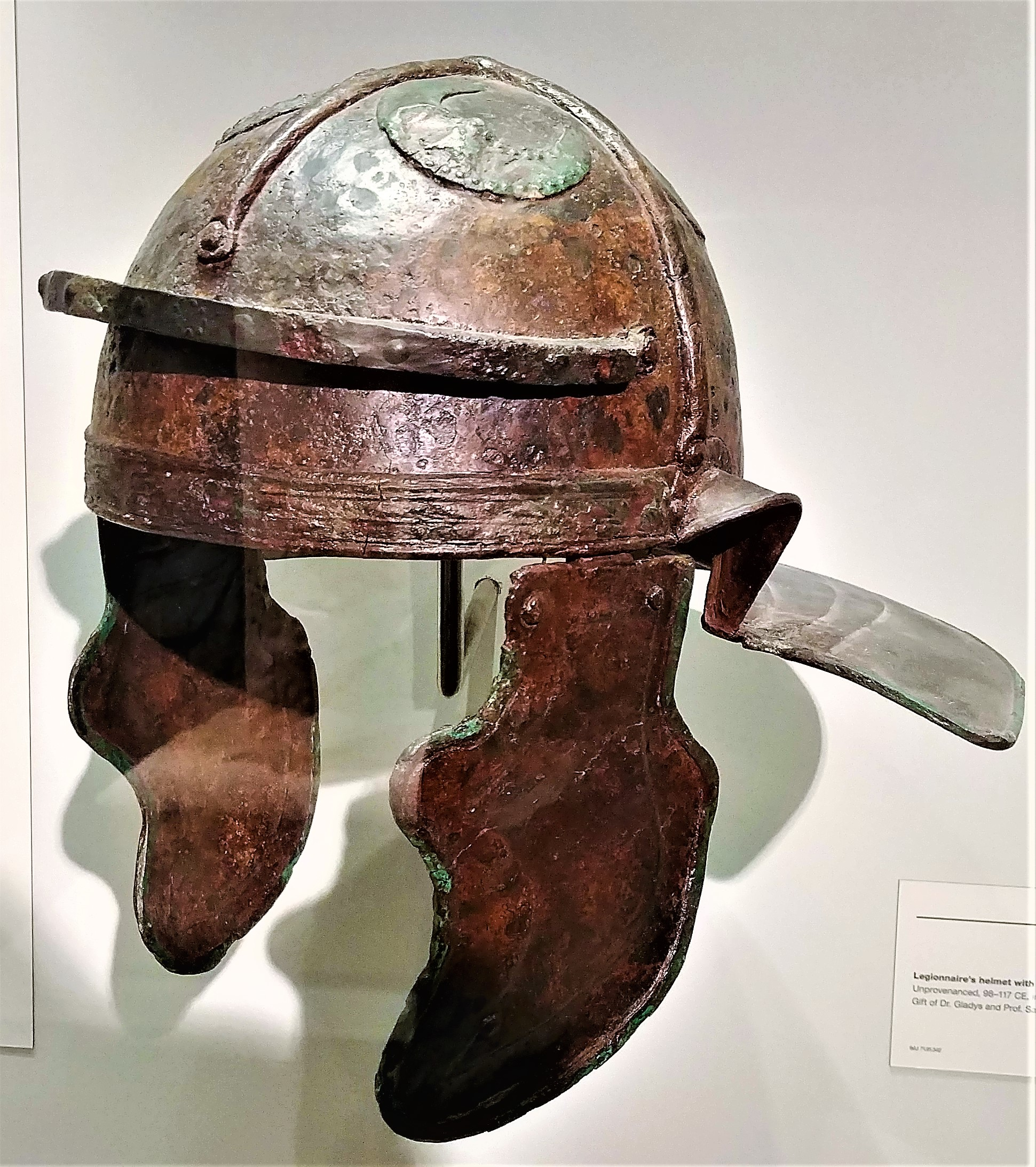 קסדת חייל רומאי, כפי שמוצגת במוזיאון ישראל